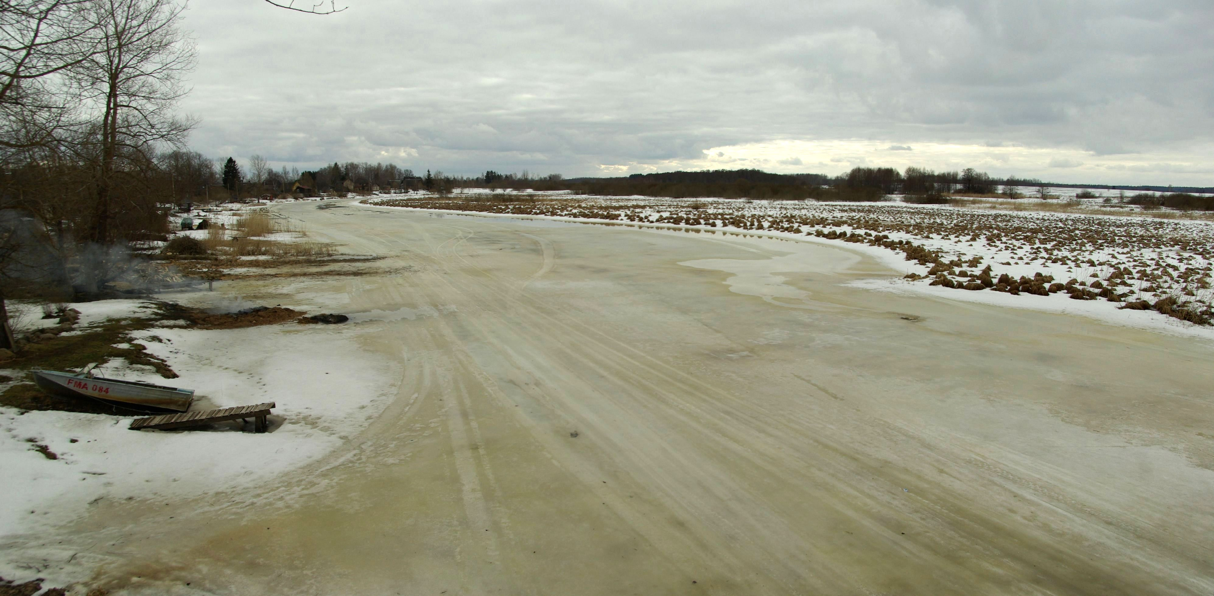 Võhandu jõgi on Eesti pikim jõgi. Ta algab Saverna küla lähistelt ja suubub Võõpsu lähedal Lämmijärve.